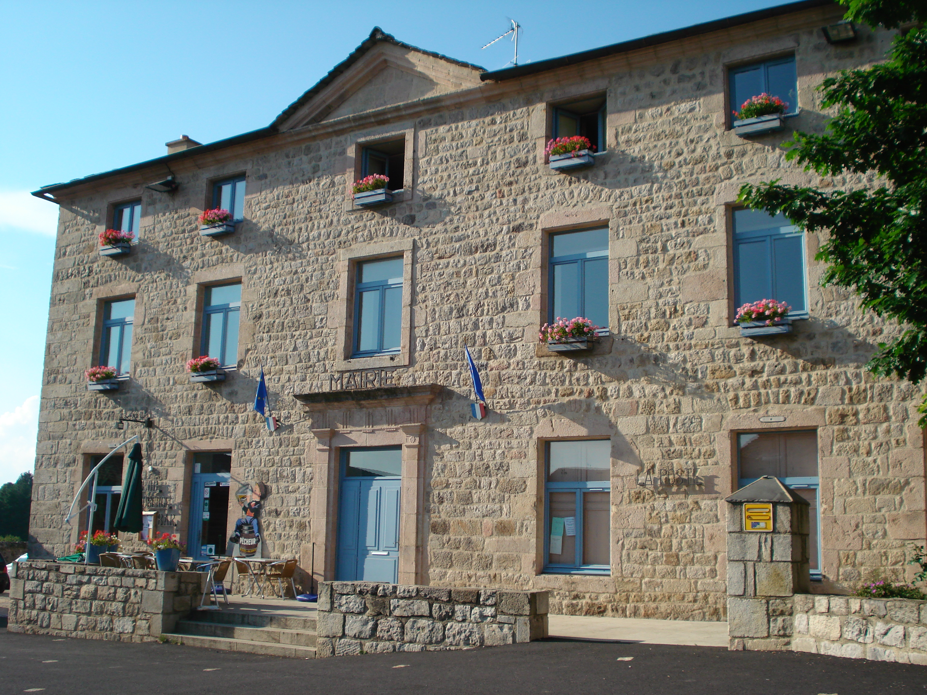 Mairie de Montregard